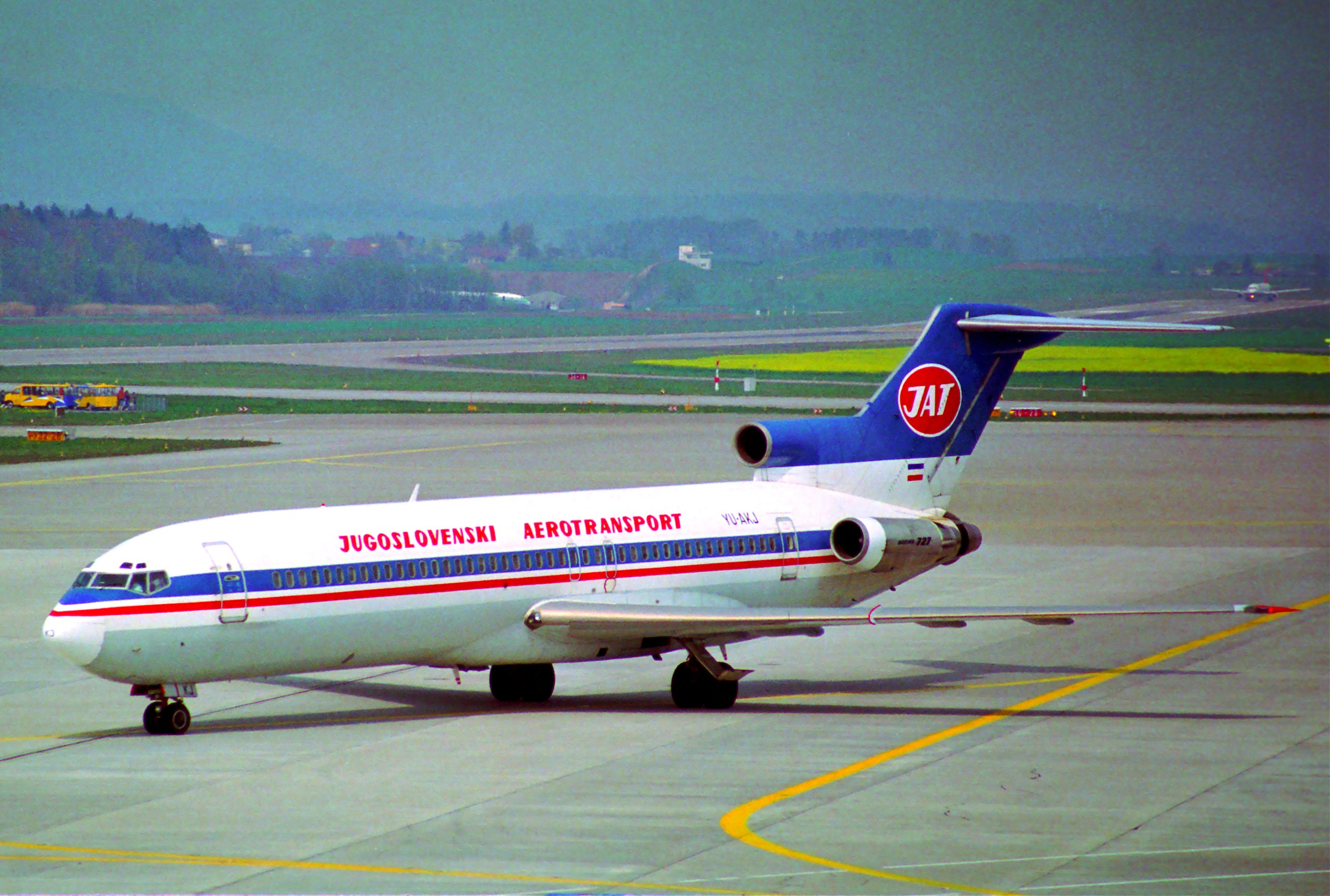 JAT Yugoslav Airlines Boeing 727-2H9; YU-AKJ@ZRH;22.04.1995